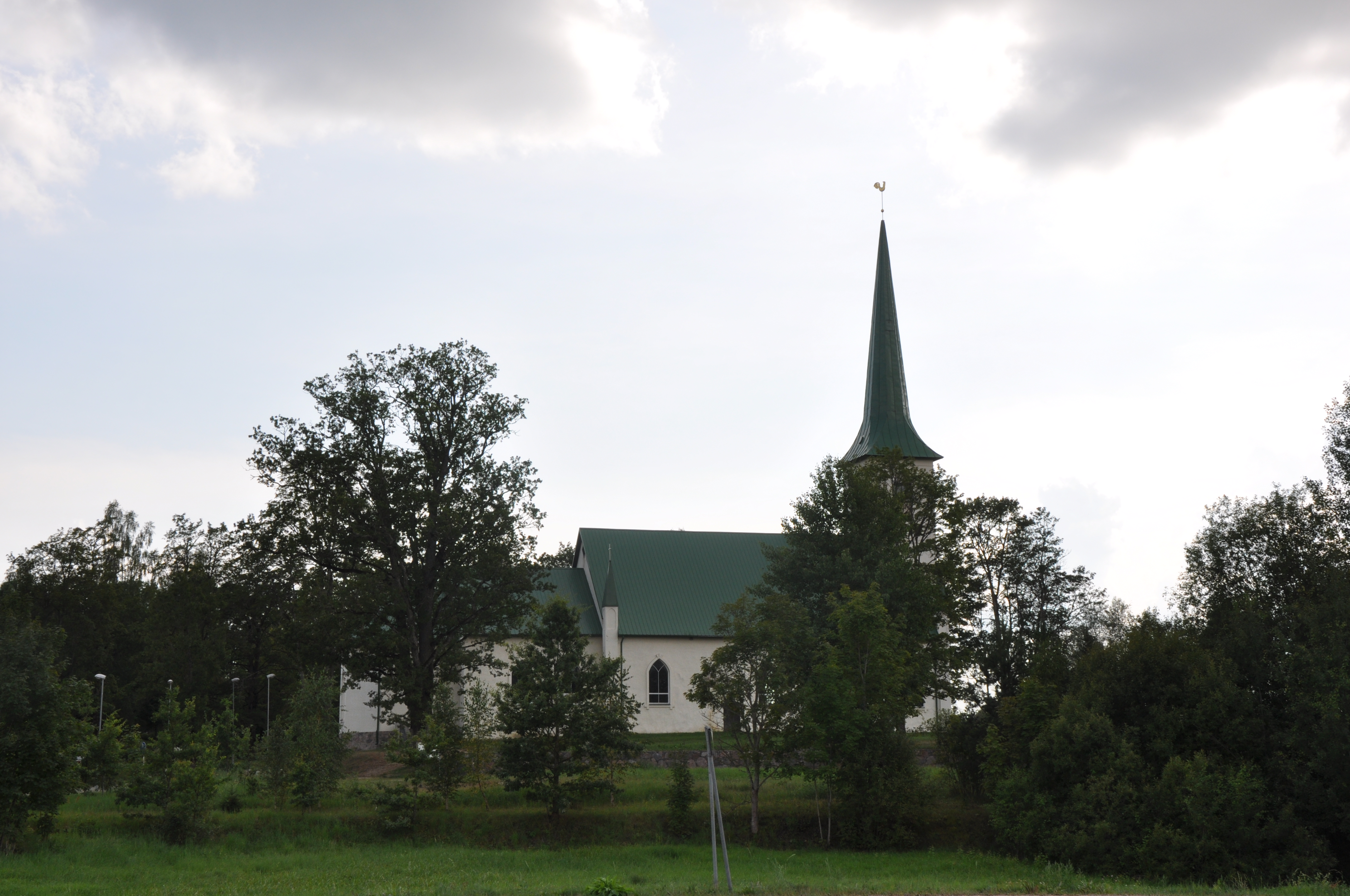 Bērzaunes evaņģēliski luteriskā baznīca, Bērzaune, Bērzaunes pagasts, Madonas novads, Latvia.